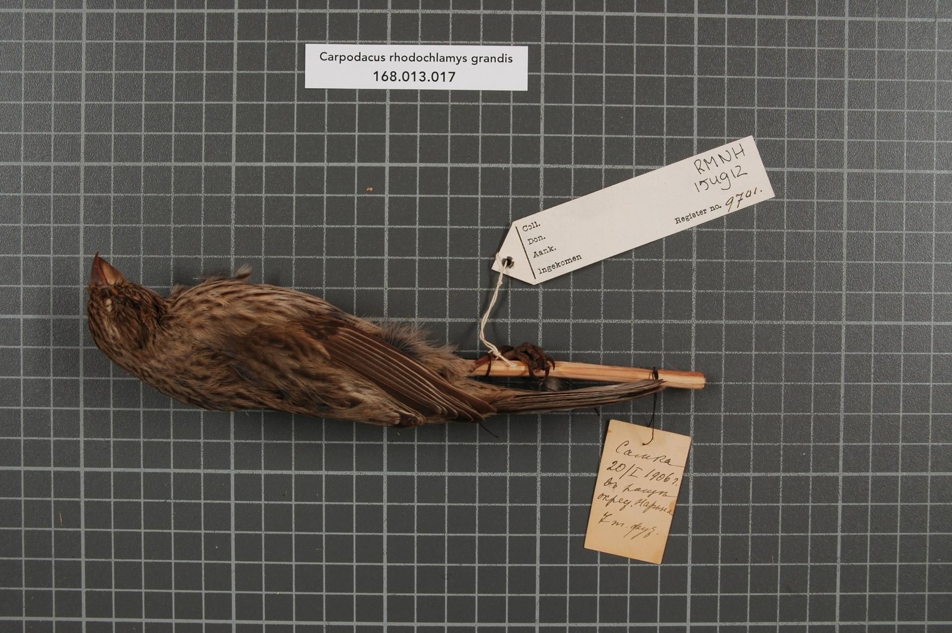 Carpodacus rhodochlamys grandis Blyth, 1849